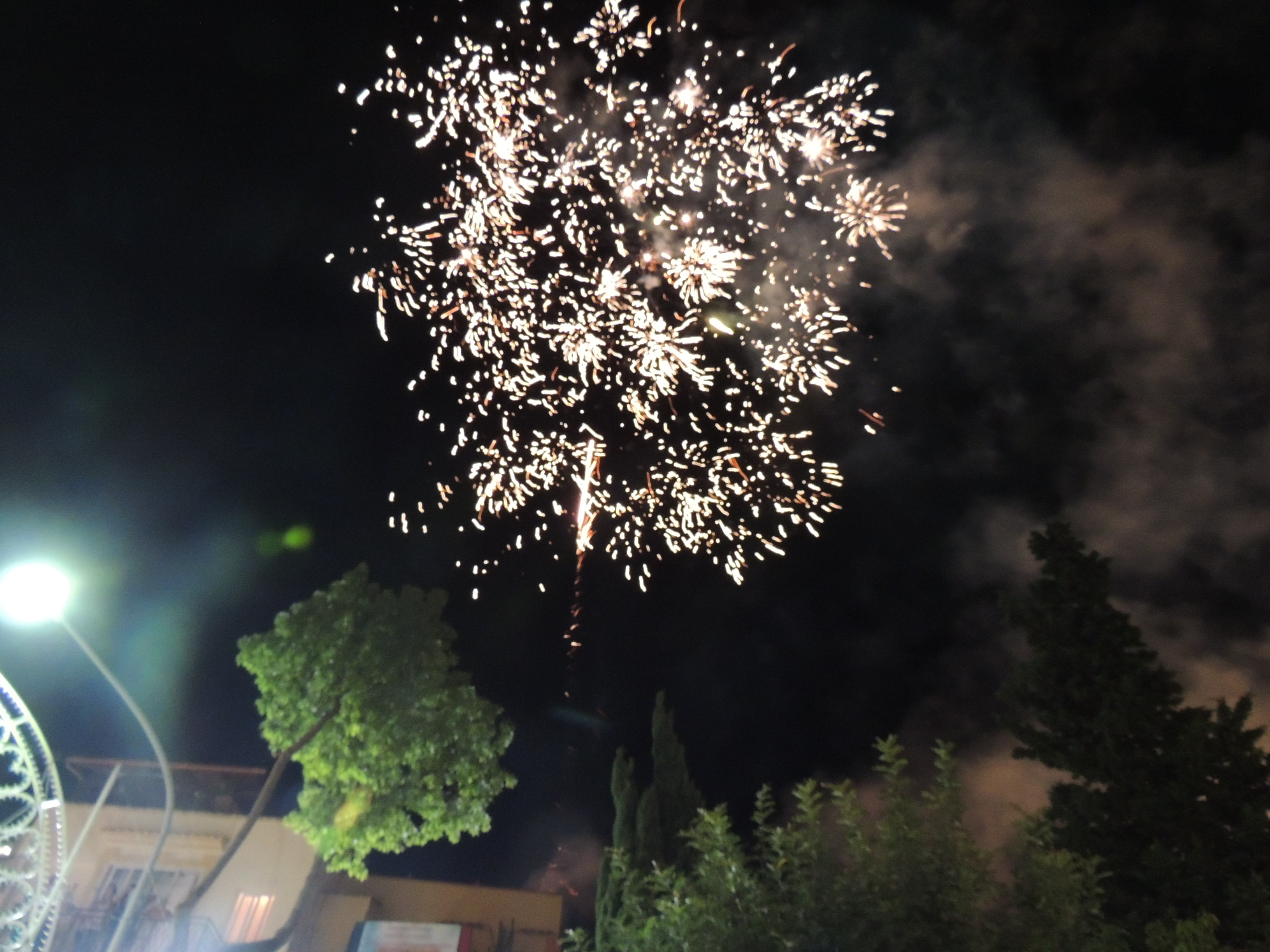 fuochi per la festa dei santi Cosma e Damiano a Sferracavallo